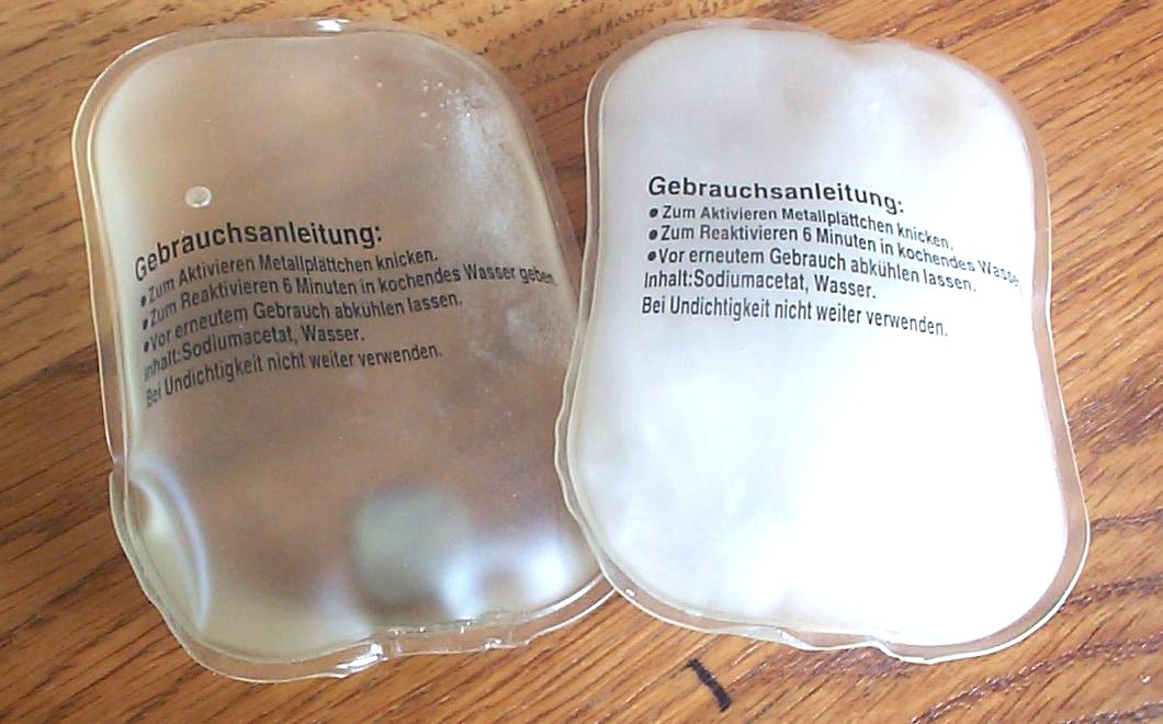 Latentwärmespeicher, Taschenwärmer